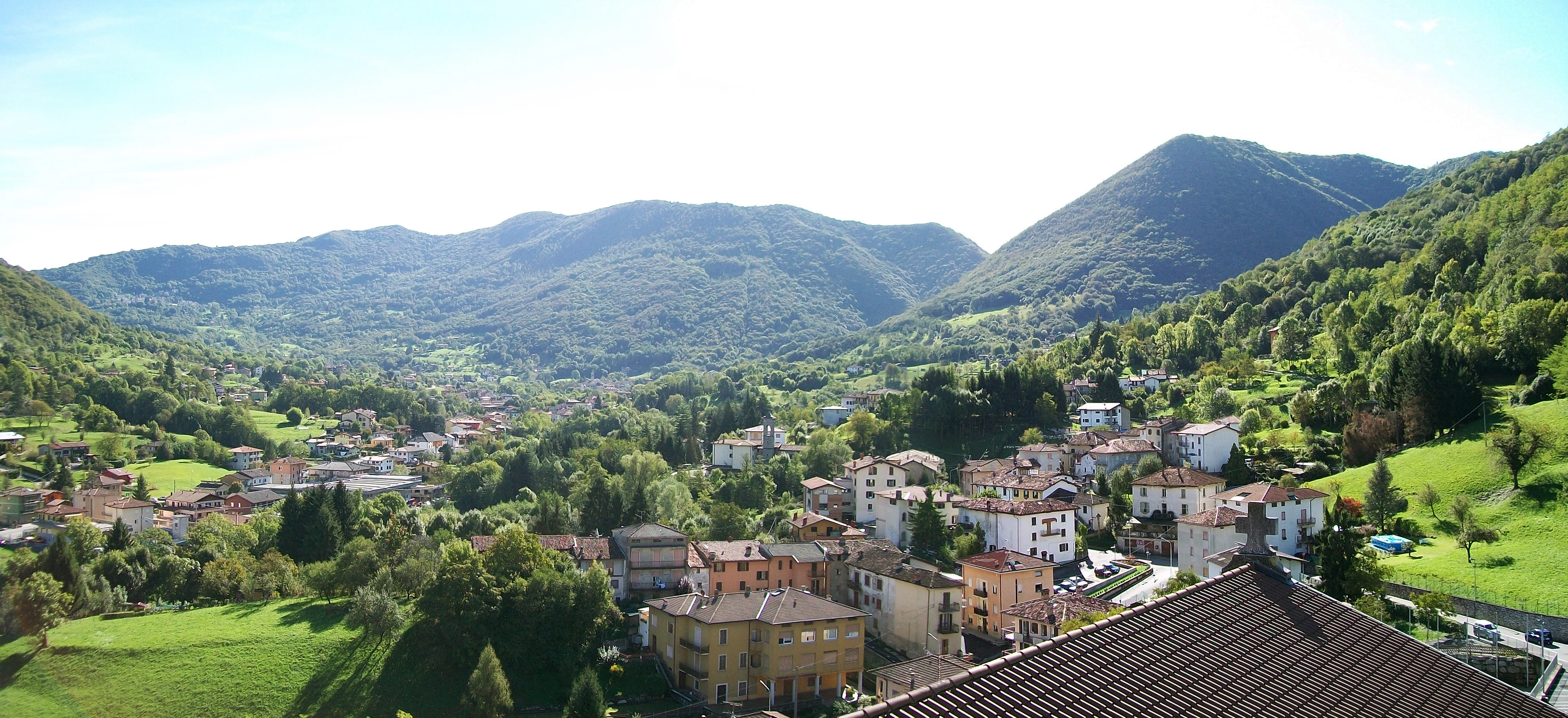 Vista del centro di Fiobbio e della Valle del Lujo dal campanile della chiesa parrocchiale